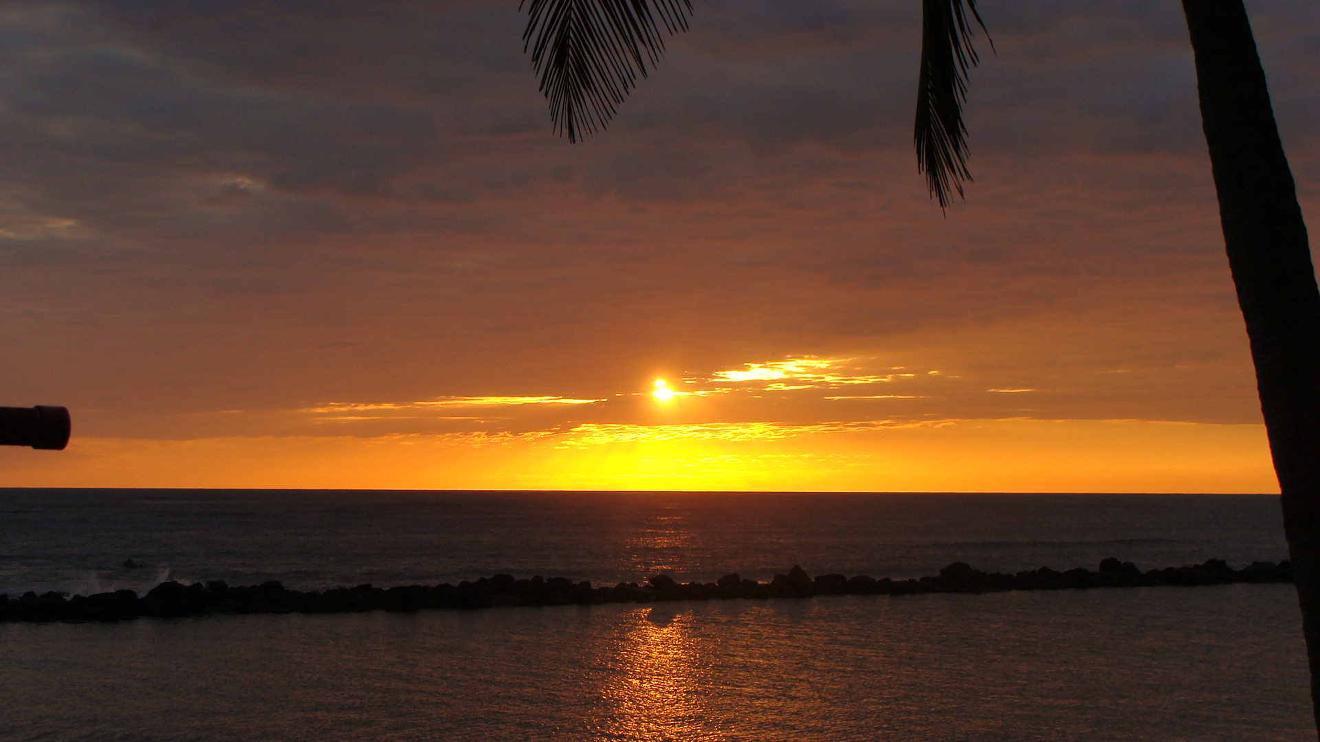 Un atardecer captado en la playa Salinitas en El Salvador. Específicamente en el Royal Decameron Salinitas Resort